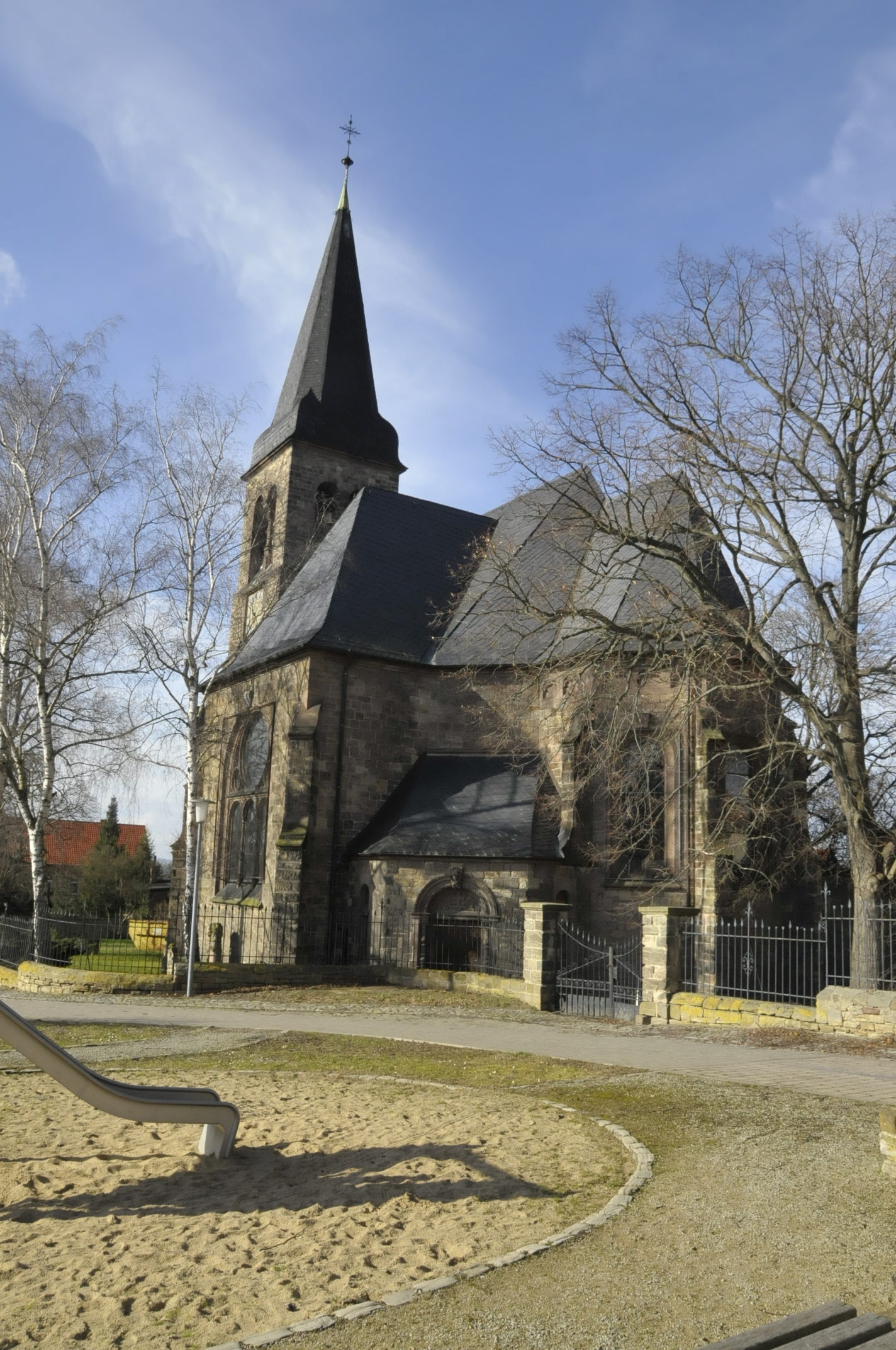 Bretleben, Kirche